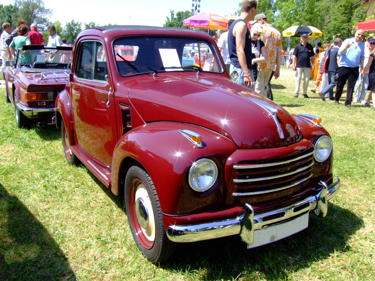 NSU-Fiat mit 16,5 PS (Baujahr 1953)